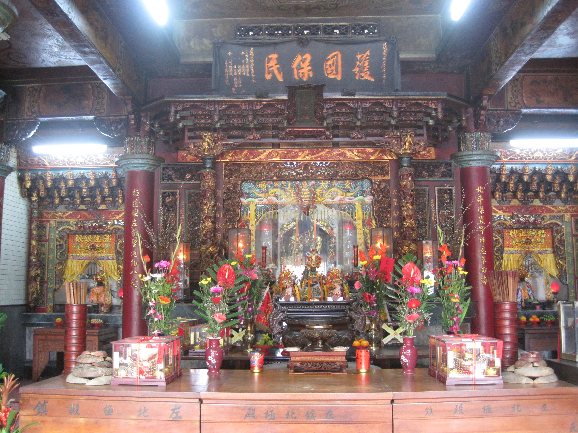 中文（台灣）: 左鎮北極殿內部